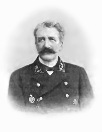 Граф Николай Иванович де Рошфор, русский архитектор